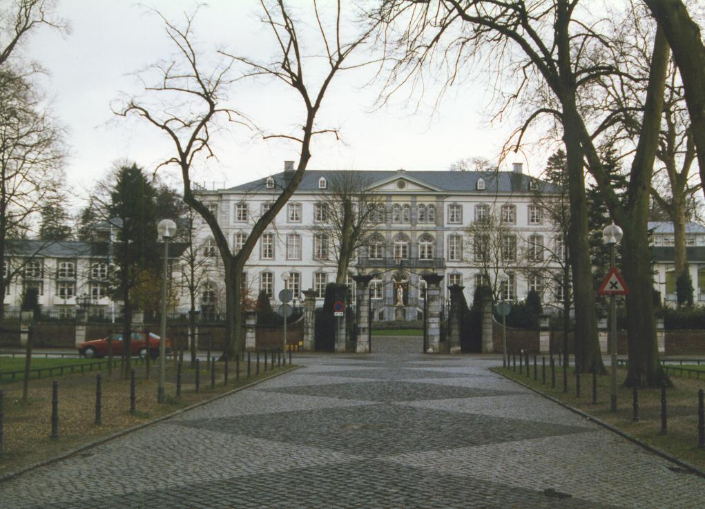 Kasteel Bloemendal te Vaals.